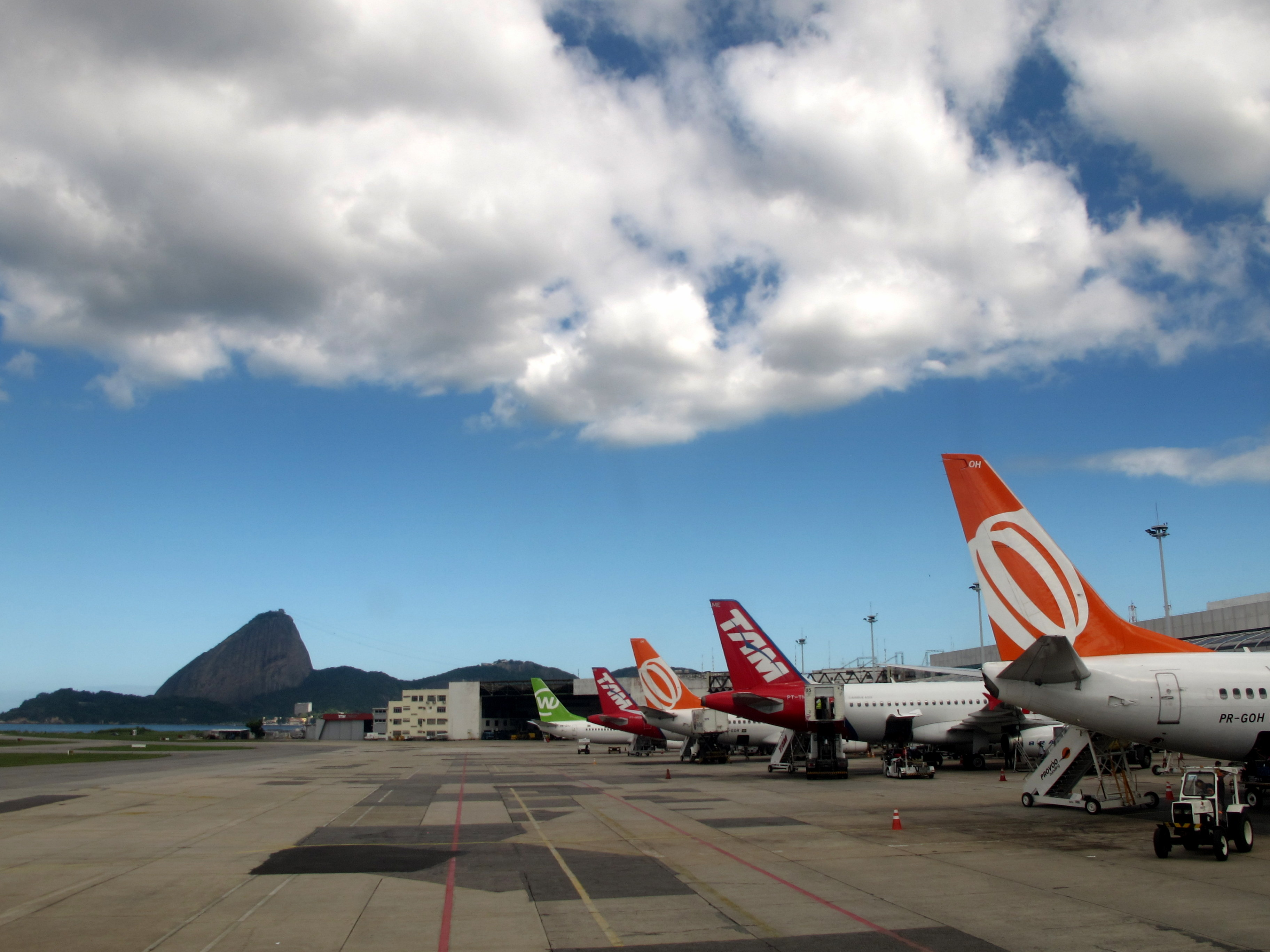 Aterro do Flamengo - Aeroporto Santos Dumont